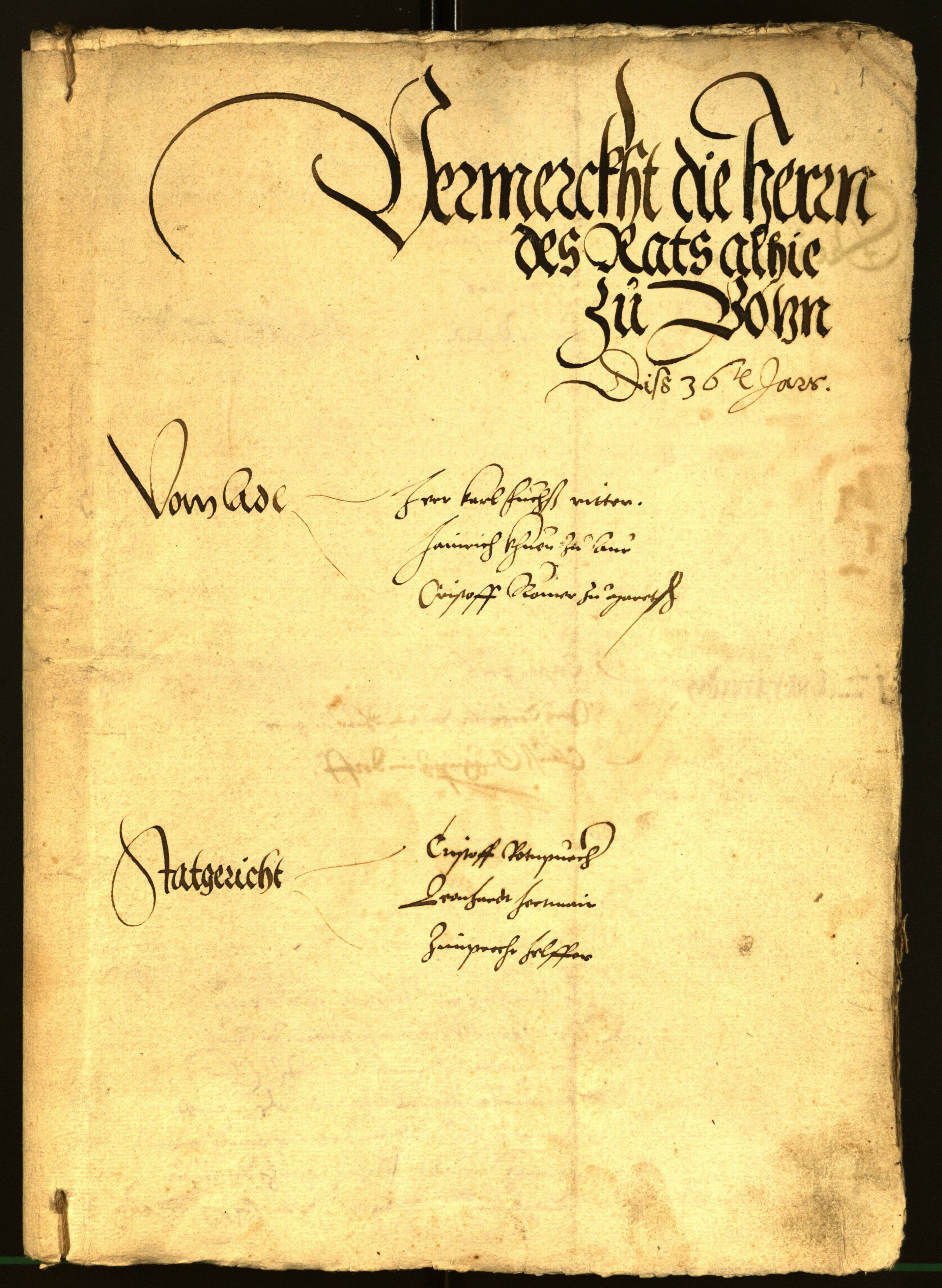 Ratsprotokoll 1536, Stadtarchiv Bozen